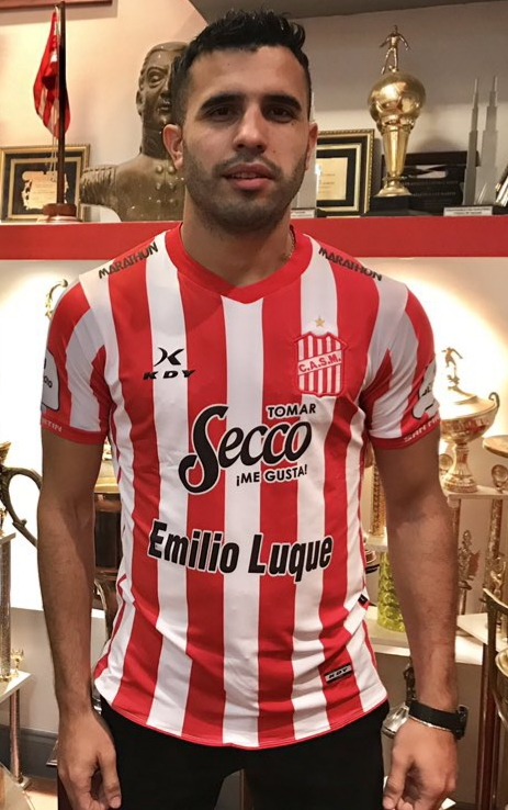 Pier Barrios posando con la camiseta de San Martín de Tucumán